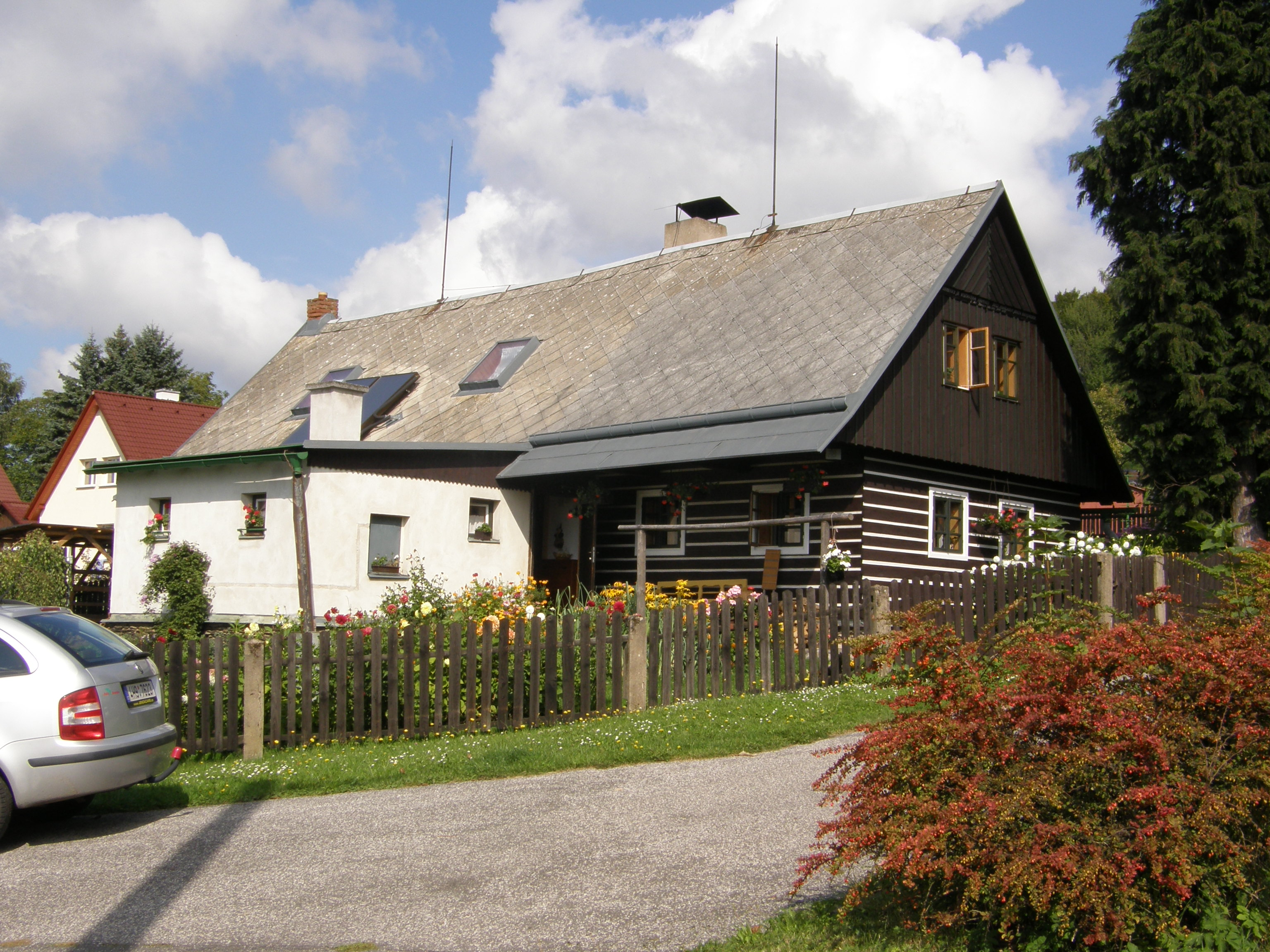 Dům na Sendraži